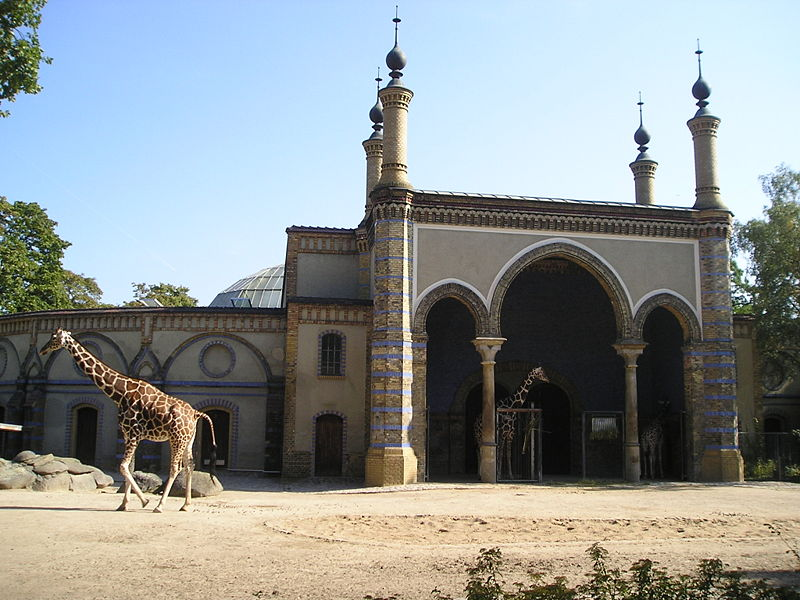 Zoo di Berlino